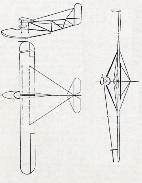 wodnoszybowiec MT-1 - rzuty